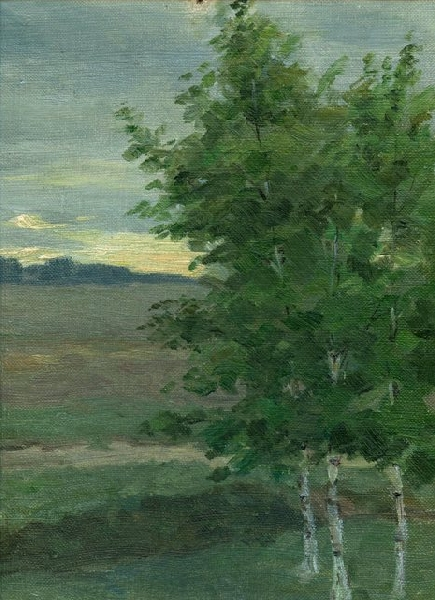 Адамс Алкснис (1864-1897). Этюд с березами.